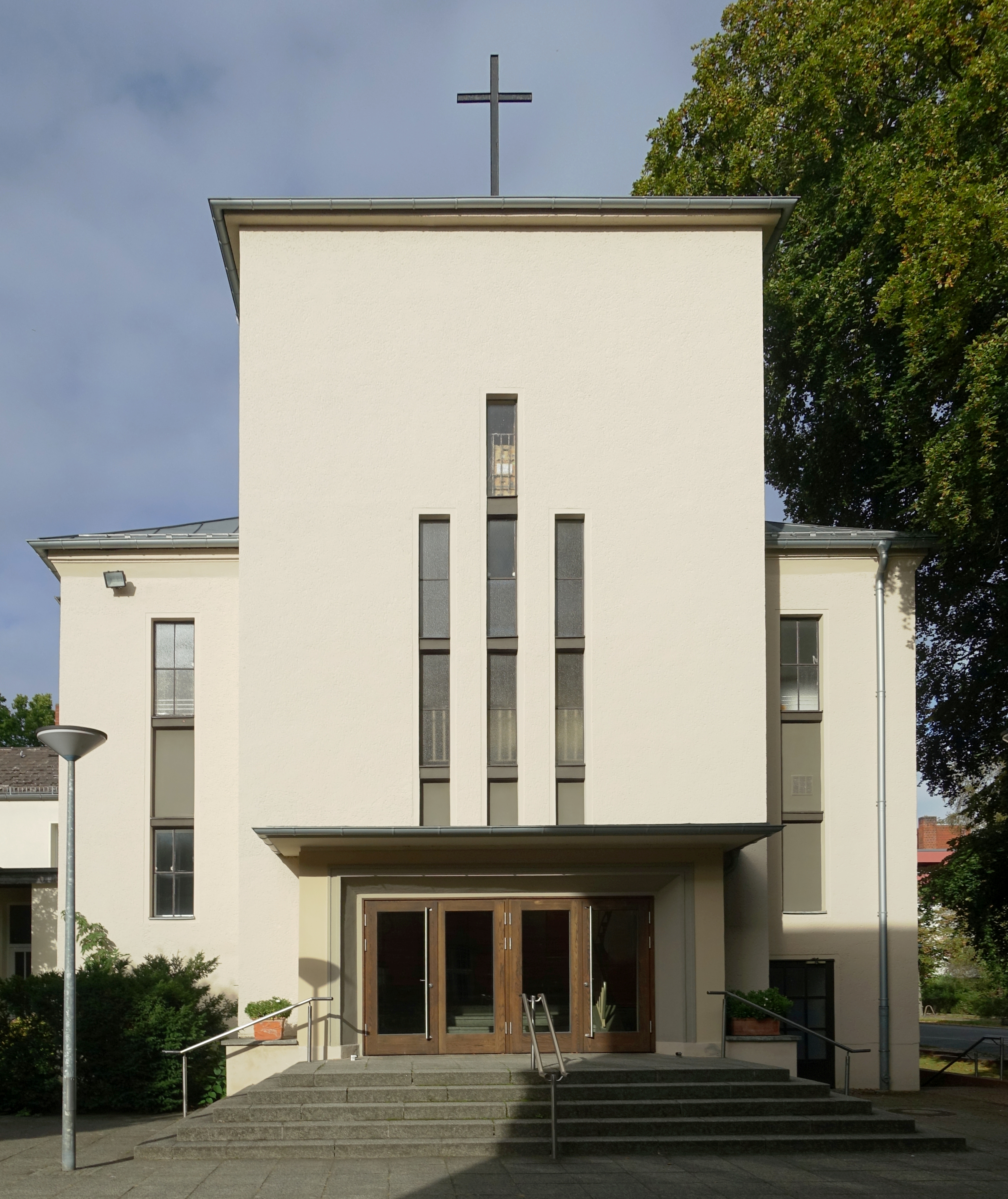 Blick auf die Portalseite und den Turm